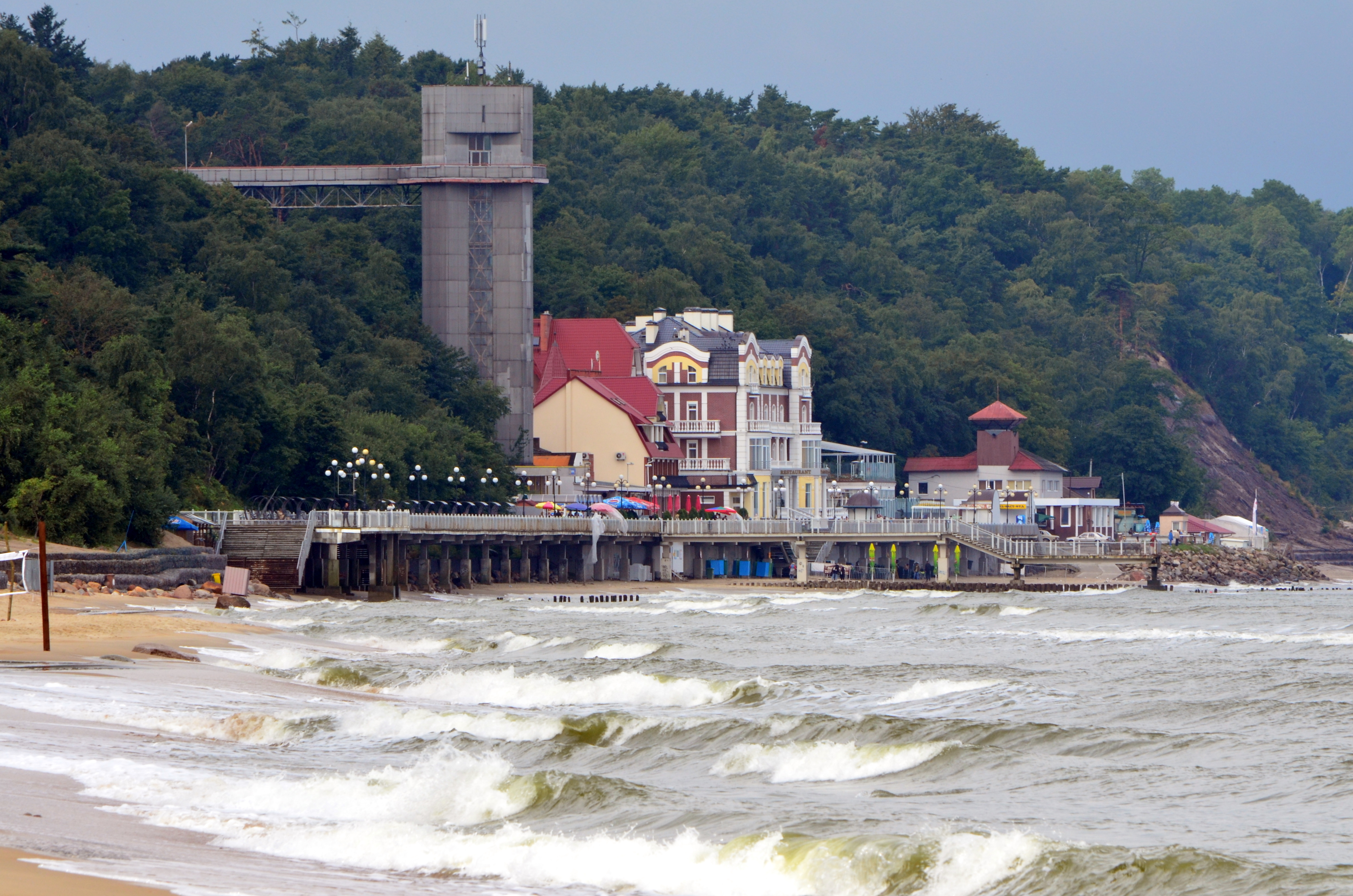 Rauschen: Strand im August 2011.